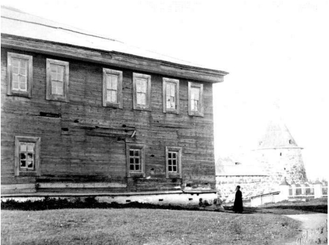 Соловецкий монастырь. Здание Архангельской гостиницы. В стене пробоины от английских ядер после бомбардировки 1854 года.